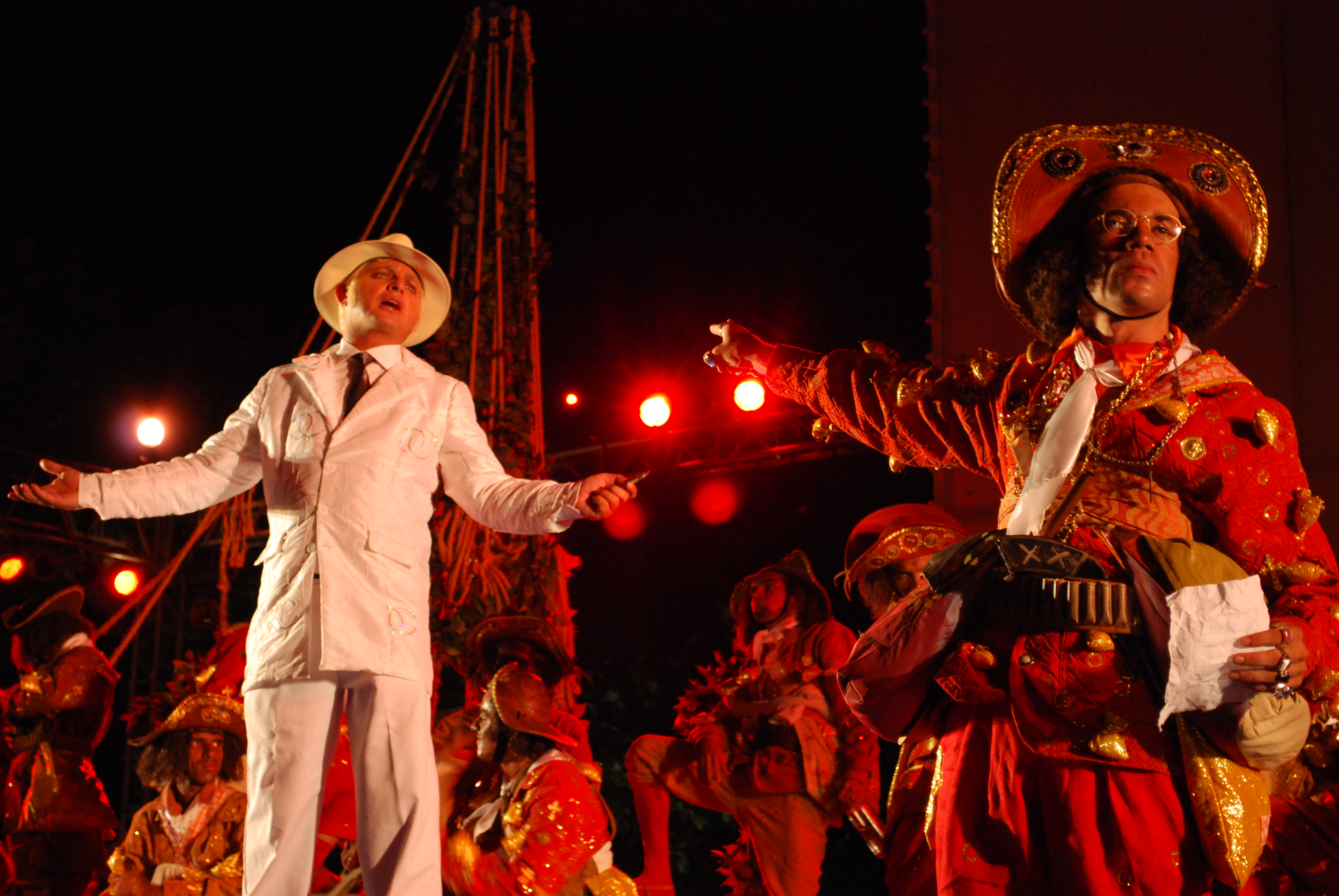 Espetaculo "Chuva de Bala no país de Mossoró" durante o Mossoró Cidade Junina 2009.